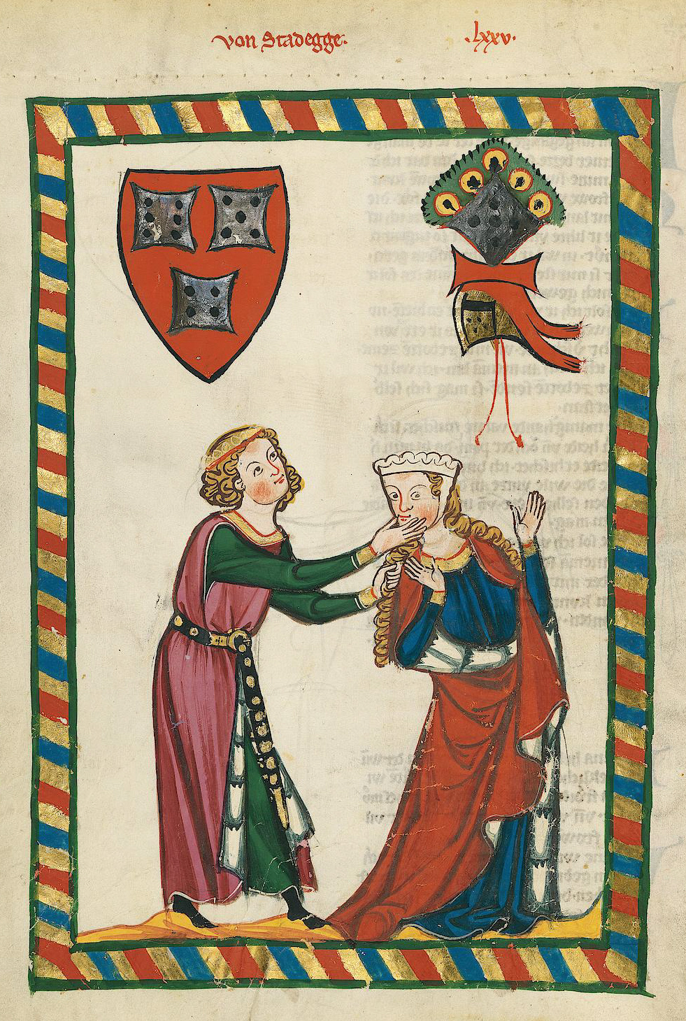 Codex Manesse, UB Heidelberg, Cod. Pal. germ. 848, fol. 257v: Von Stadegge